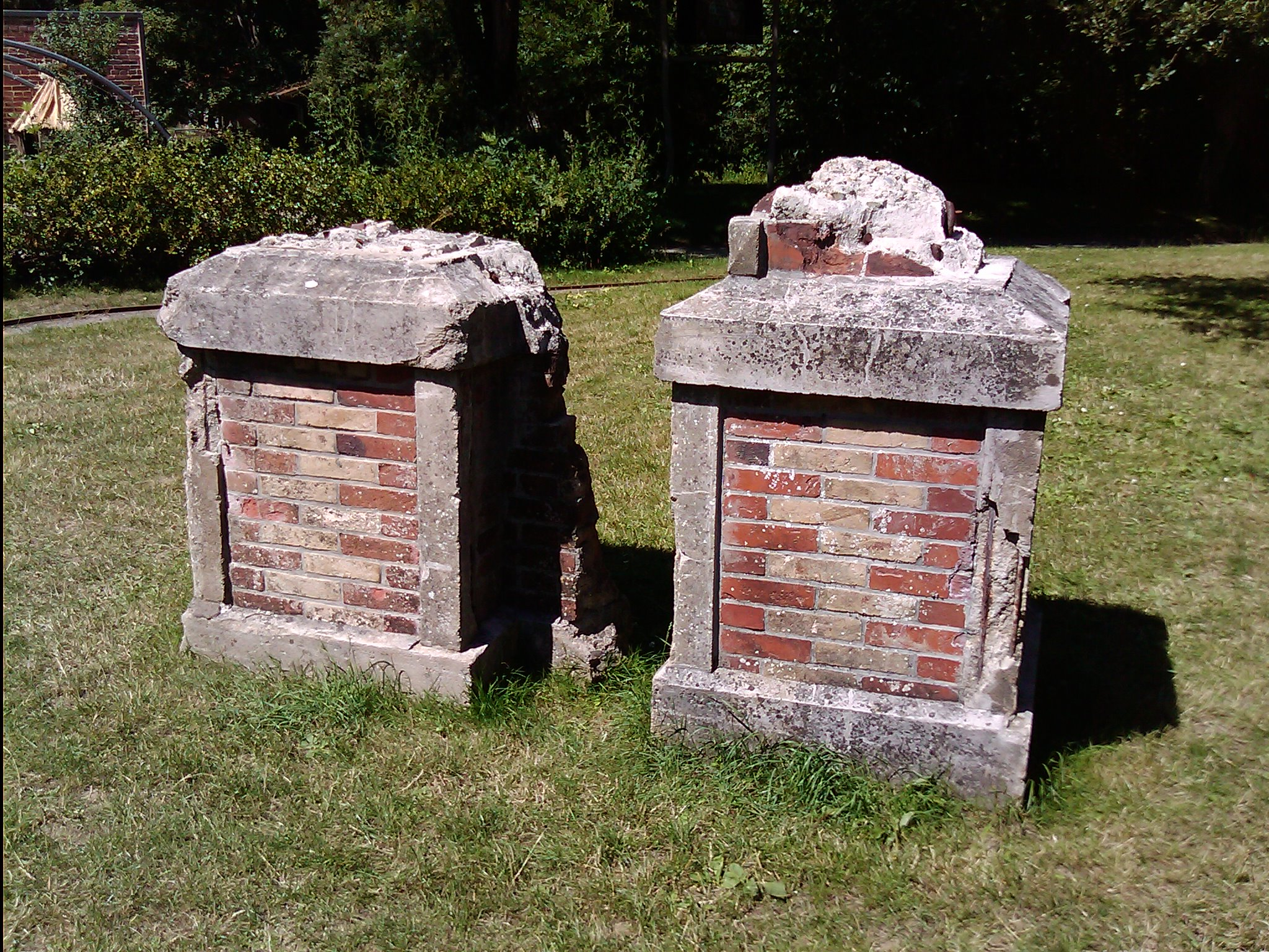 Vestiges du viaduc de Souzain dans le parc de la Briqueterie à Langueux.